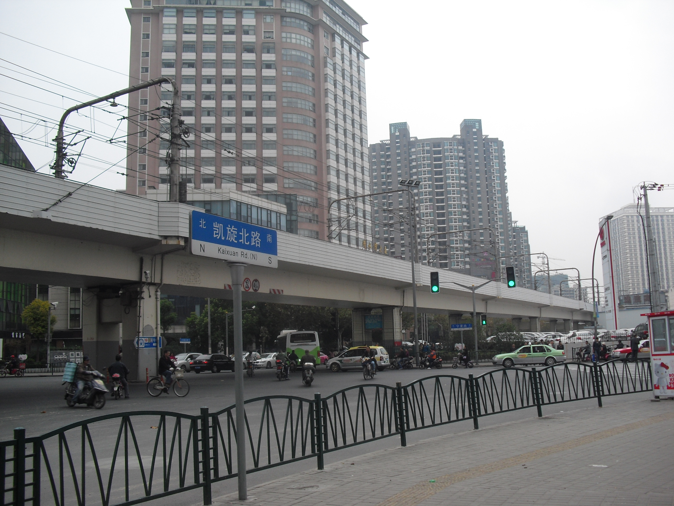 金沙江路站前，凯旋北路。